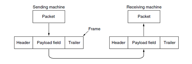 Kanal səviyyəsi şəbəkə səviyyəsindən paketləri alır və onları transmisiya üçün kadrlara enkapsulasiya edir. Hər kadrın tərkibinə kadr başlığı (header), paketi yerləşdirmək üçün yük sahəsi və kadr sonluğu (trailer) daxildir.